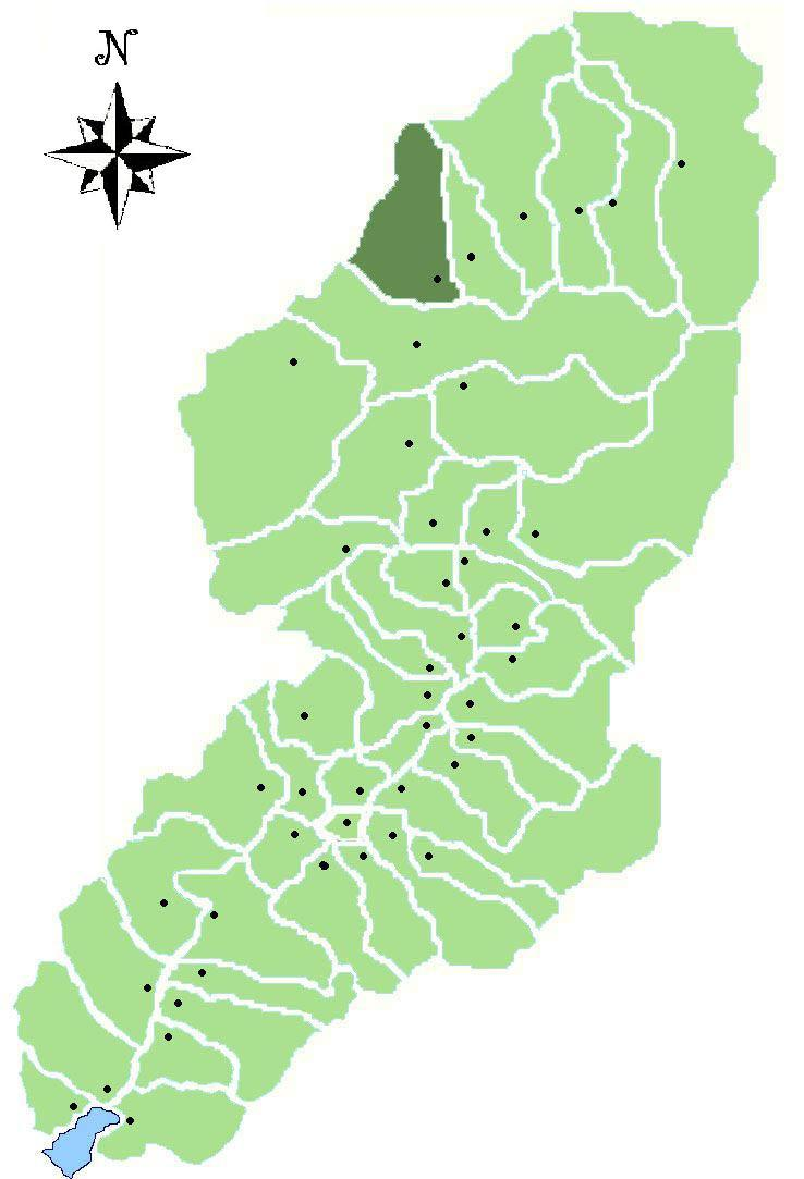 {[en|Map of the Comune di Monno, Valle Camonica}]